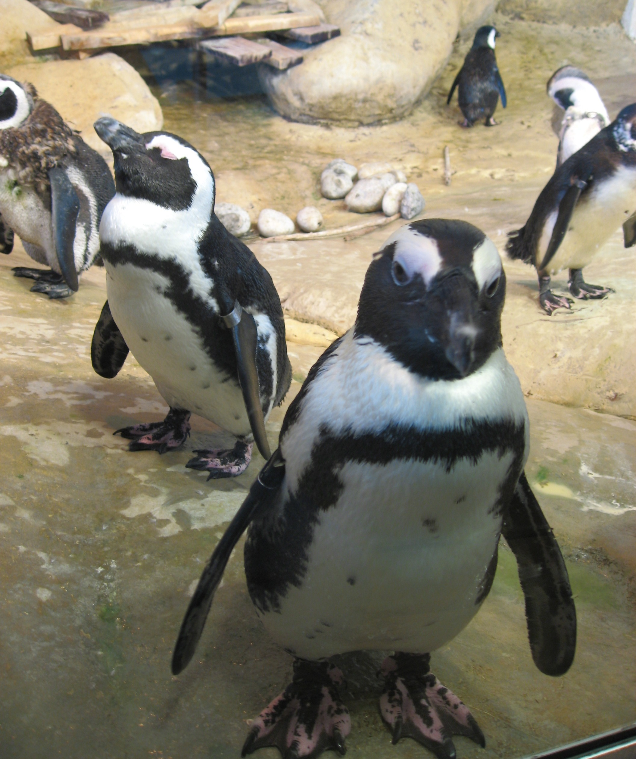 Spheniscus demersus in Nausicaä Centre National de la Mer